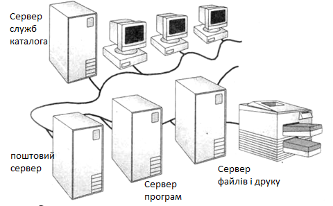 Спеціалізовані сервери